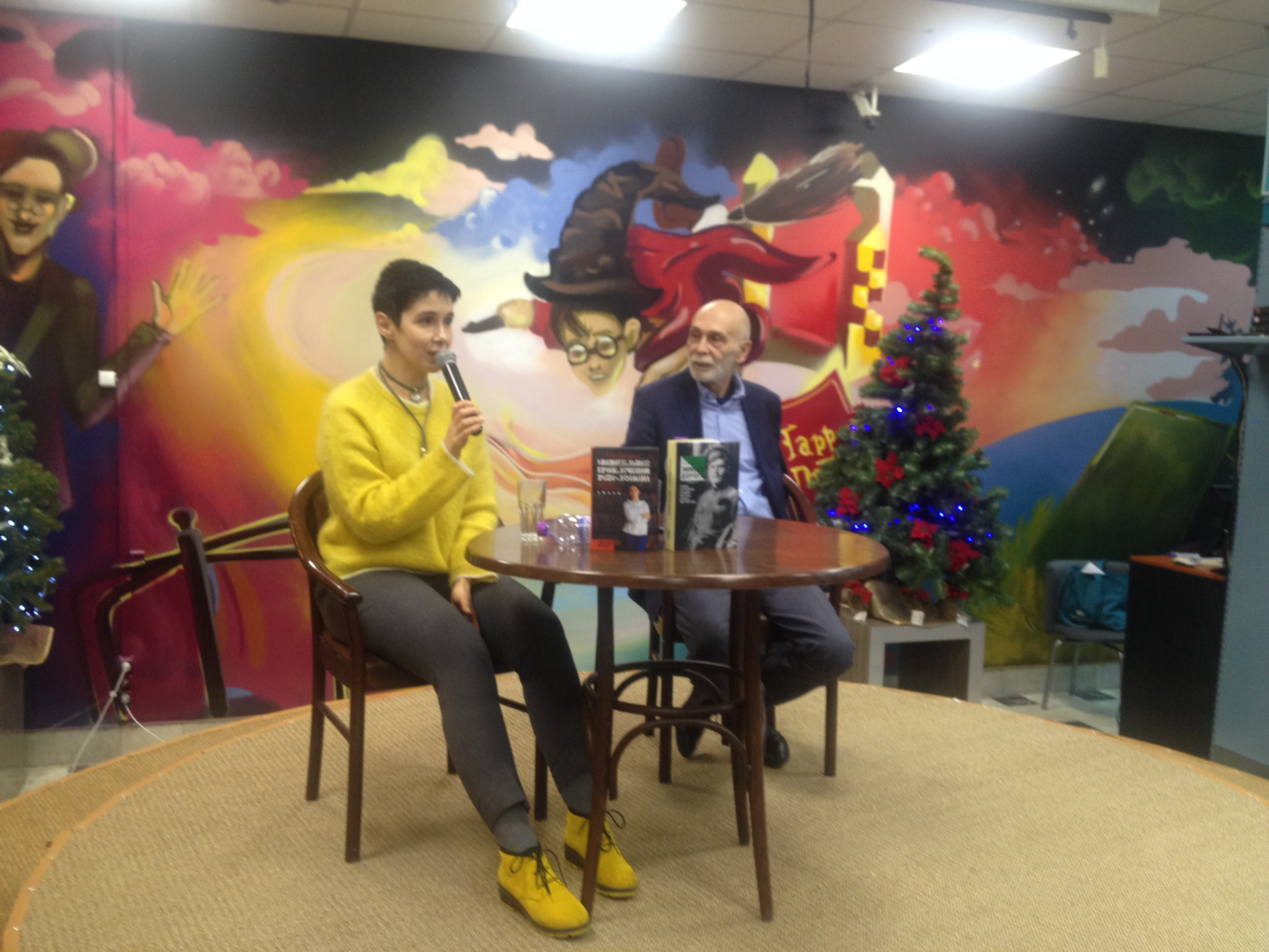 Встреча с писателем Леонидом Юзефовичем и литературным критиком Галиной Юзефович, которая прошла 18 декабря 2016 гоа в 15.00 в Московском Доме книги. Диалог посвящен современной русской литературе, литературным итогам года, а также книгам «Зимняя дорога» и «Удивительные приключения рыбы-лоцмана».